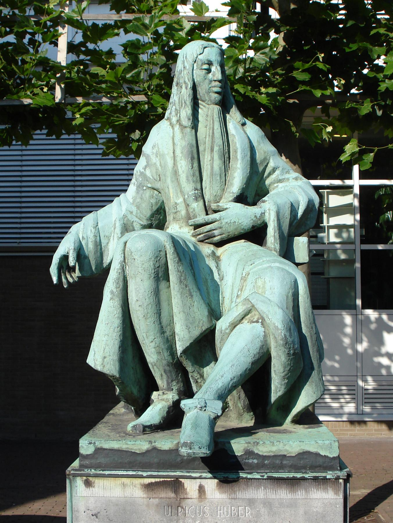 Den Haag, centrum, Kazernestraat. Kunstwerk "Ulricus Huber" van Frits van Hall. Den Haag/The Netherlands.